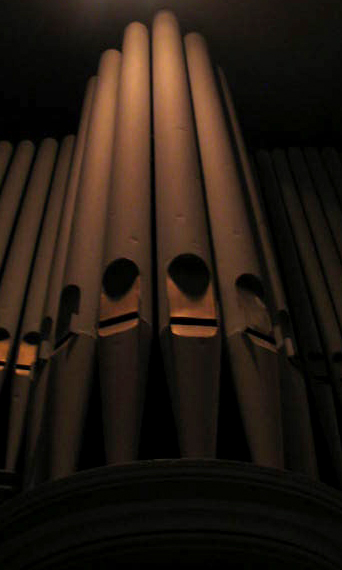 Orgue Casavant 1915. Église Notre-Dame-de-Grâce. Source Photographie prise le 31 août 2007 par Utilisateur:Duruf